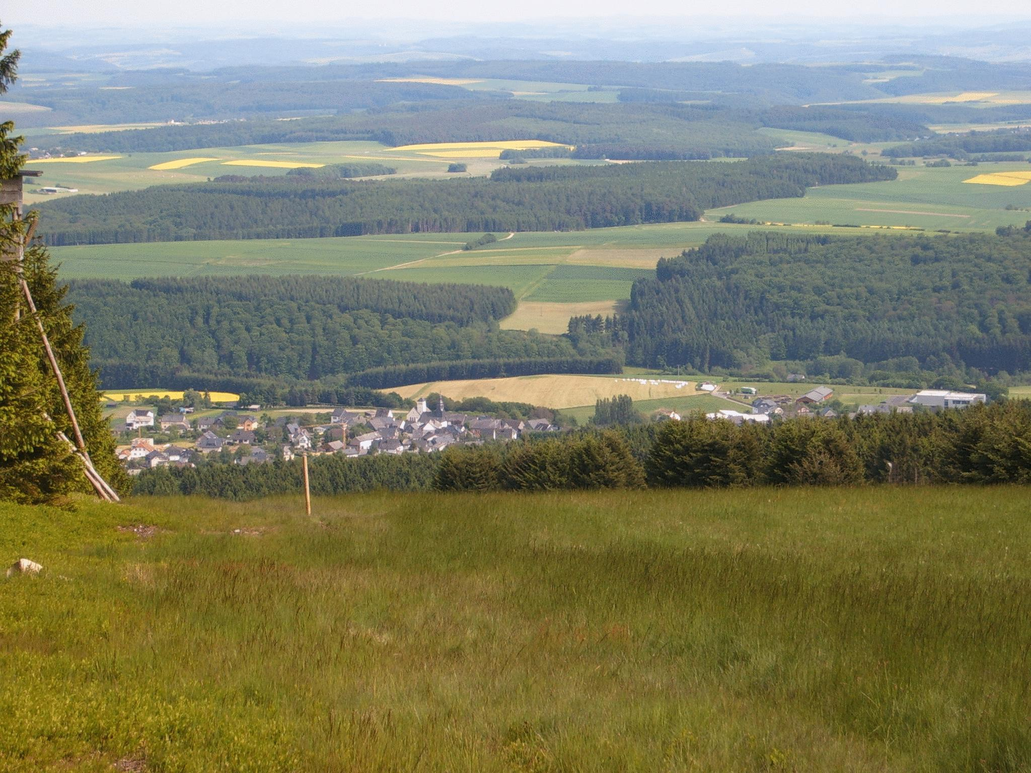 Bildbeschreibung: Blick vom Idarkopf Quelle: selbst fotografiert Fotograf: Matw